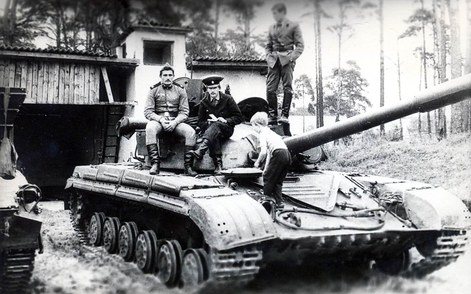 Ein T-64 der 21. Garde-Motorisierten-Schützen-Division der Gruppe der Sowjetischen Streitkräfte in Deutschland in Perleberg in den frühen 1980er-Jahren.